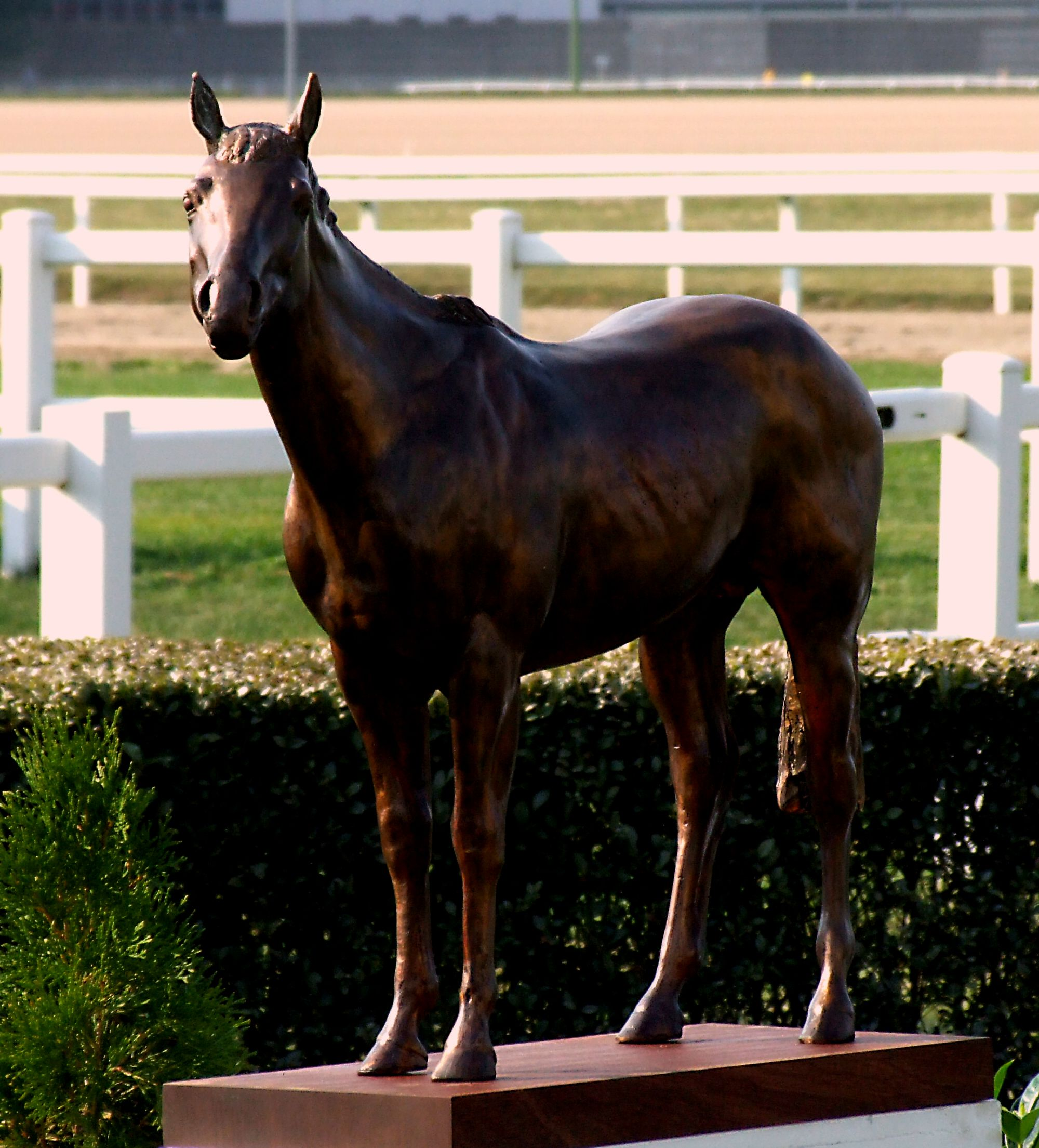 Overdose szobra Engler András alkotása. A szobor avatása a 2012-es Magyar Derby napján. Kincsem Park